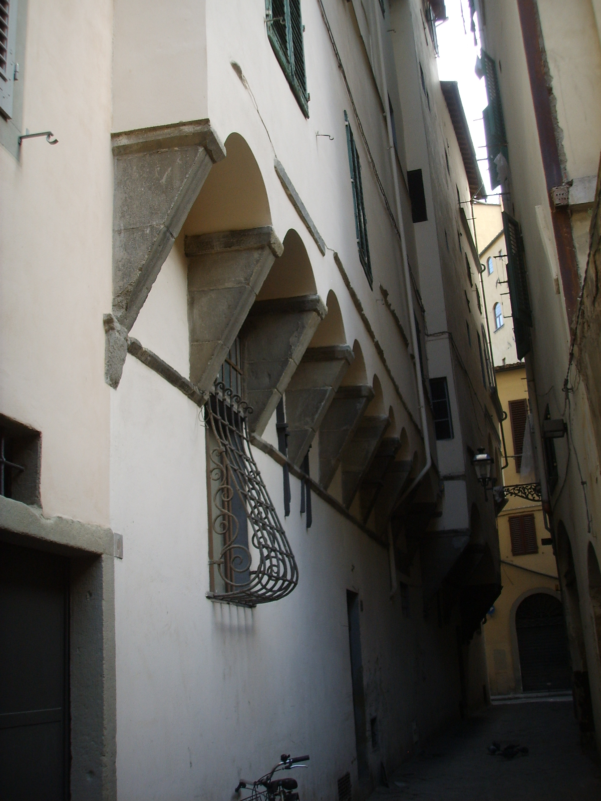 Palazzo de' nobili 04 sporti